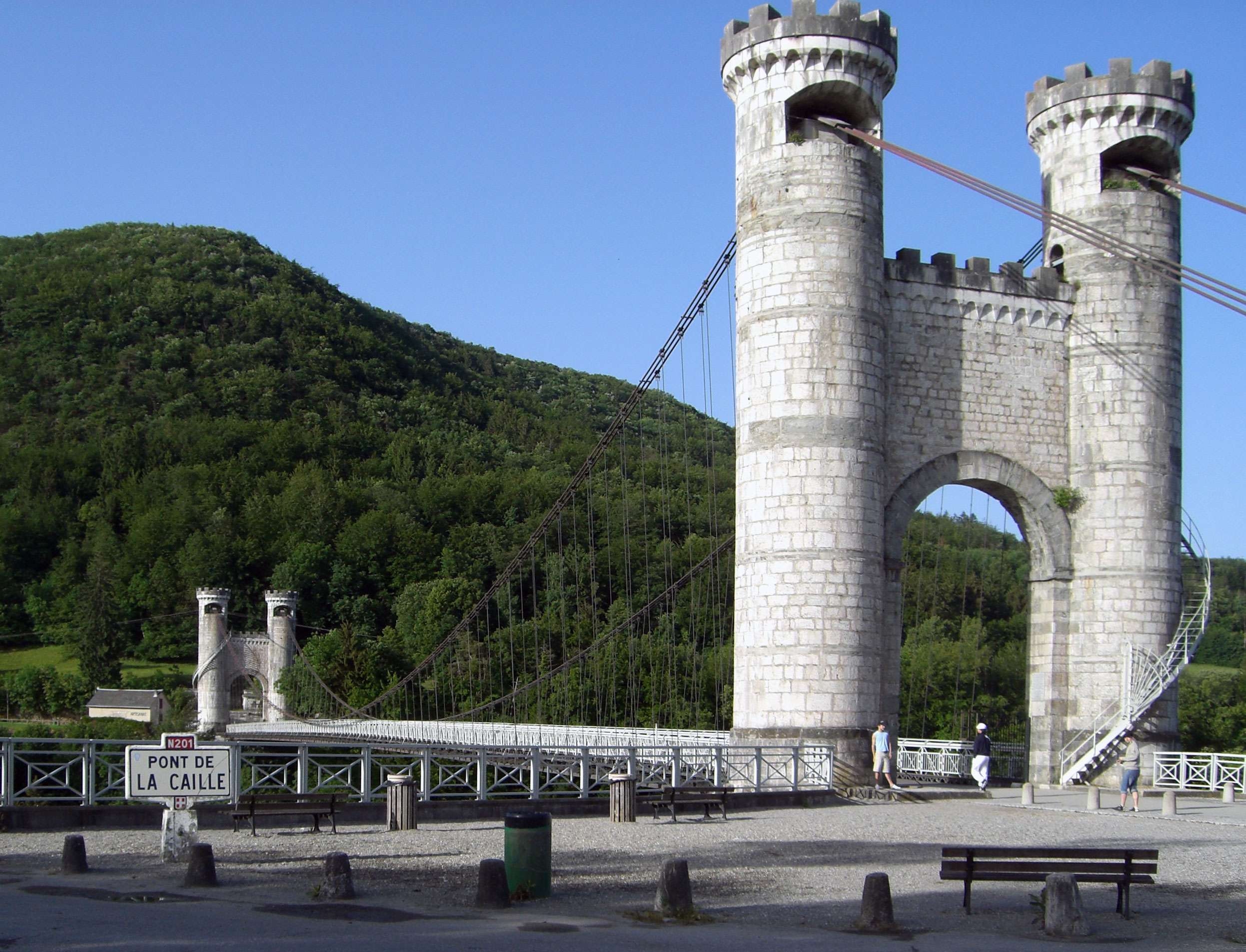 Pont de la Caille, France